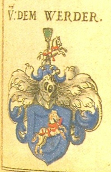 Wappen derer von dem Werder (ursprgl. Hildesheimer Ministerialengeschlecht), von der Hildesheimer Stammlinie entstanden die Hannoversche und Magdeburger Linie; verbreitet auch in Anhalt, Kurbrandenburg, Sachsen und Lübeck